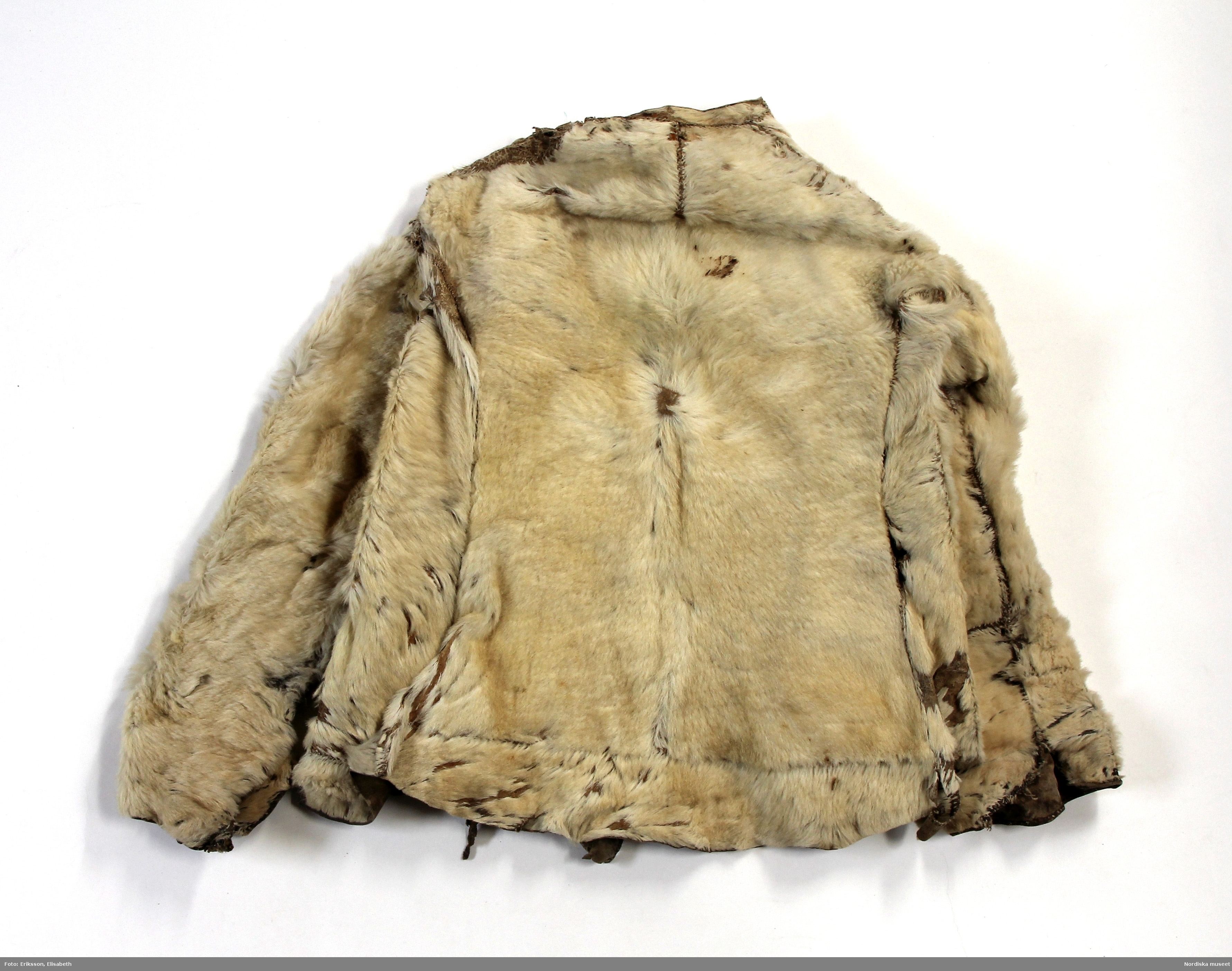 Kalvskinn.